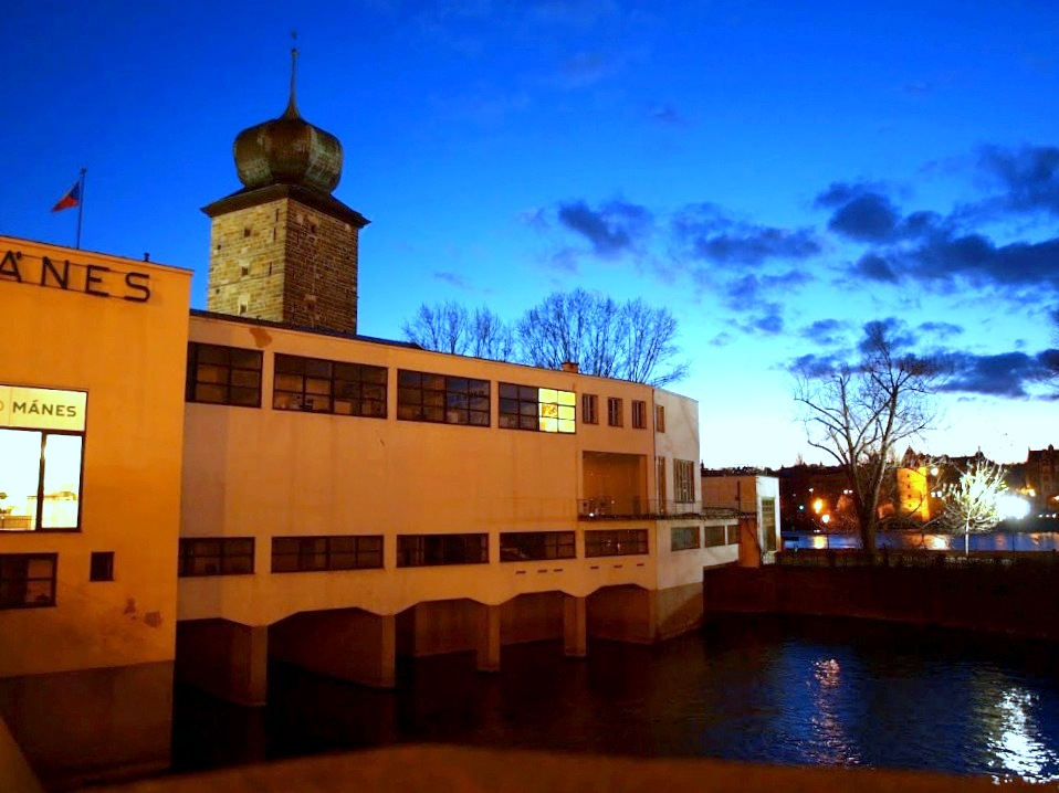 Galerie Mánes